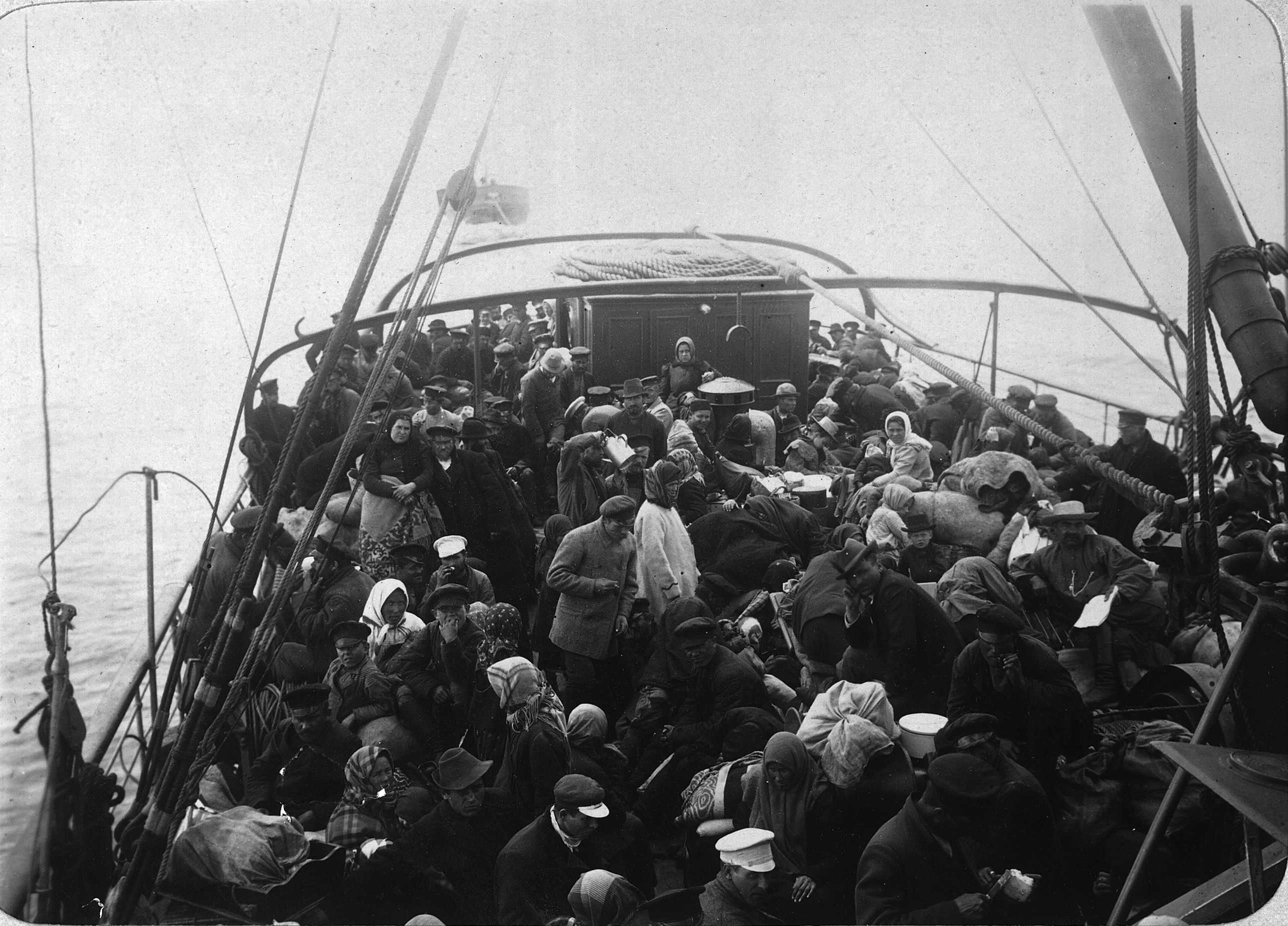 Перевоз рабочих на золотые прииски.